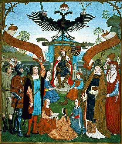 Die Stände huldigen Kaiser Maximilian I. Es handelt sich nicht um die Abbildung einer tatsächlichen Huldigung (der Papst rechts im Vordergrund hätte dem Kaiser nie gehuldigt), sondern um eine Visualisierung kaiserlicher Machtansprüche. Alle Stände vom Bauern bis zum Papst sind Maximilian untertan. Zu Füßen des Kaisers sitzen seine Tochter Margarethe und sein Enkel, der spätere Kaiser Karl V.